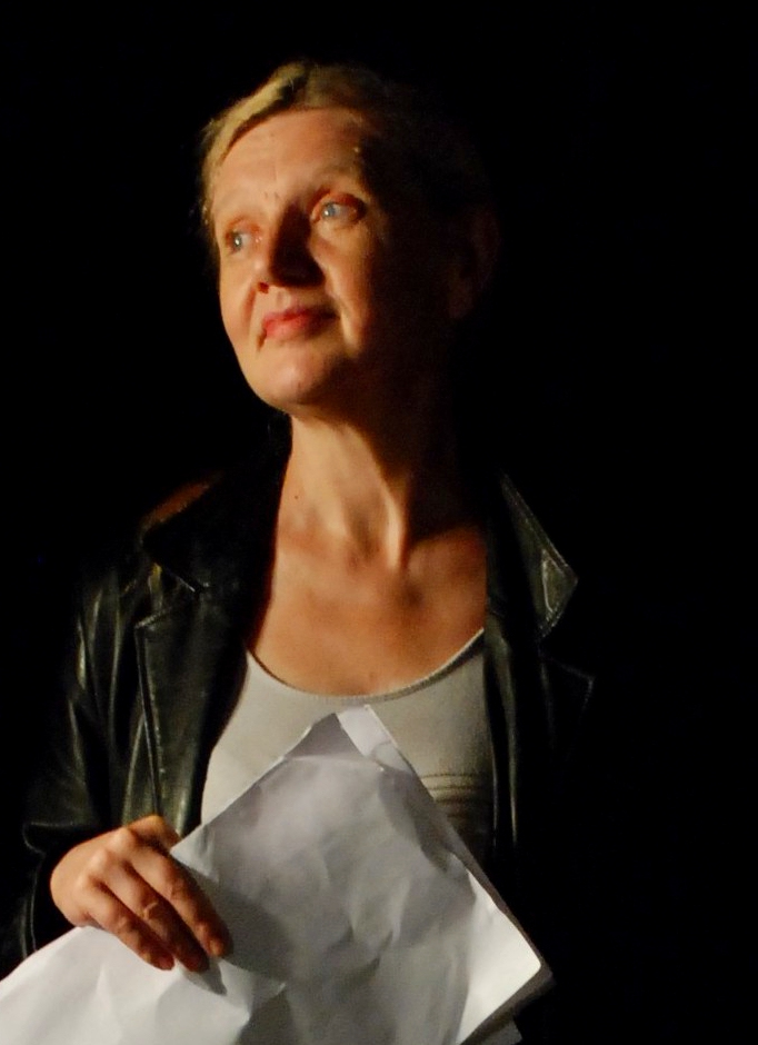 Kaari Sillamaa oma raamatu "Valede abielude " ekraniseeringu võtetel Muhus.